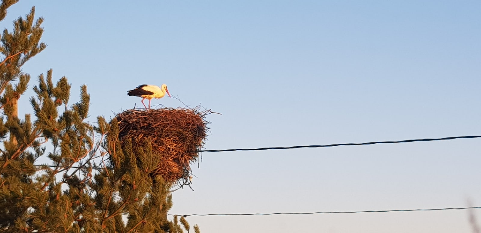 Valge-toonekurg